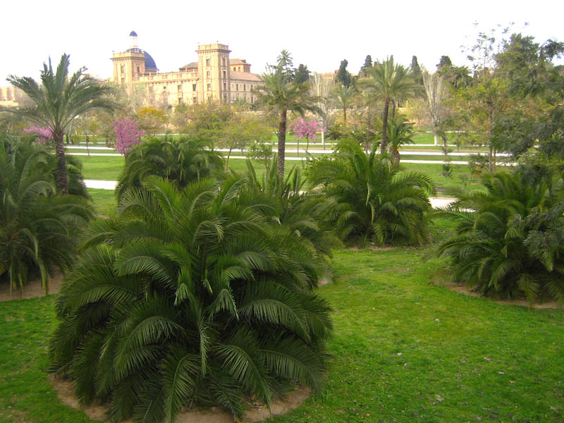 Parc del Jardí del Túria, zona Museu de les Belles Arts, València, País Valencià